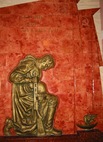 Bildbeschreibung: Im Deutsch-Russischen Museum Berlin-Karlshorst Quelle: eigene Aufnahme Fotograf: Alexander Fiebrandt Datum: August 2002